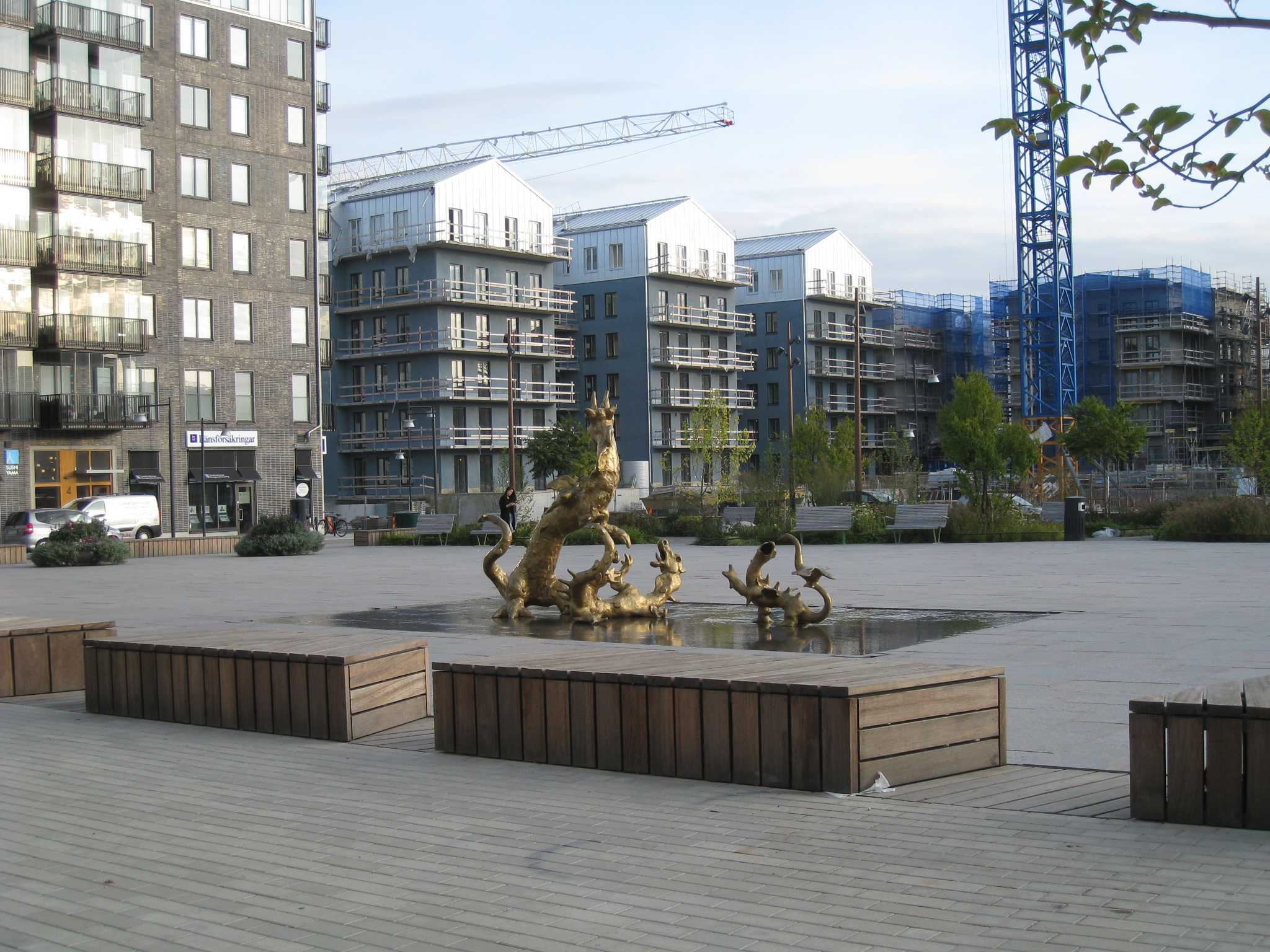 Barkarbystaden, Järfälla kommun, Stockholms län, Stora Torget med skulpturgruppen Dogfight, skapad av skulptören Fredrik Wretman (född 1953), i förgrunden.